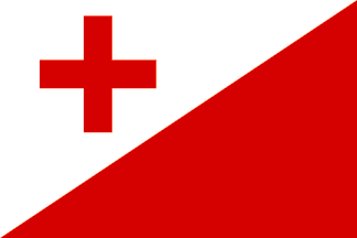 Bandera Municipal de Puebla de Montalbán (Toledo)